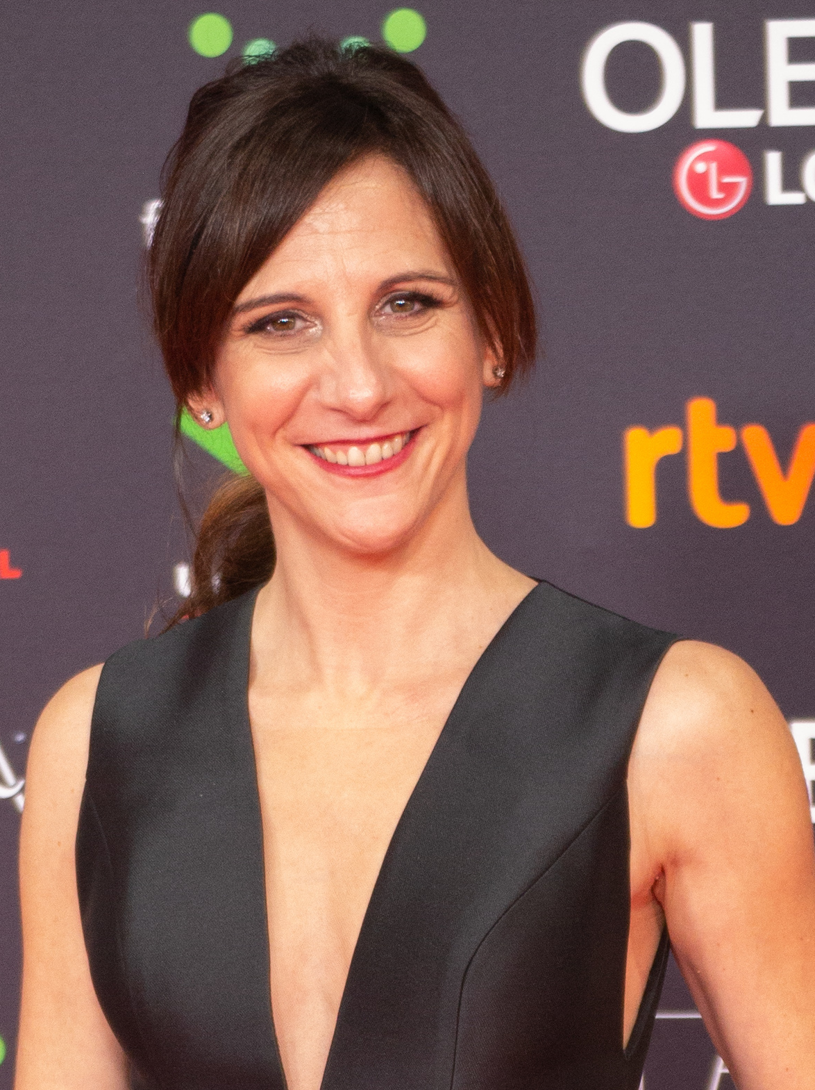 Malena Alterio en la alfombra roja de los premios Goya celebrados en Málaga en enero de 2020